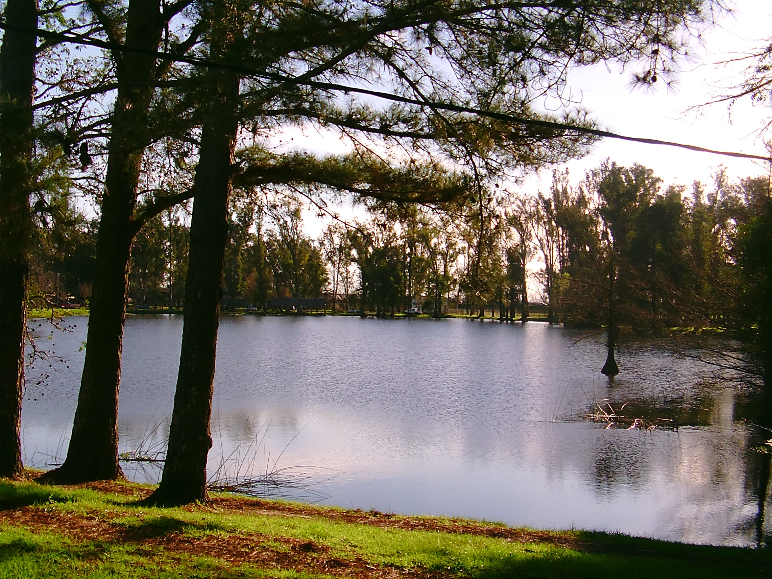 Laguna de las Lavanderas Tacuarembó